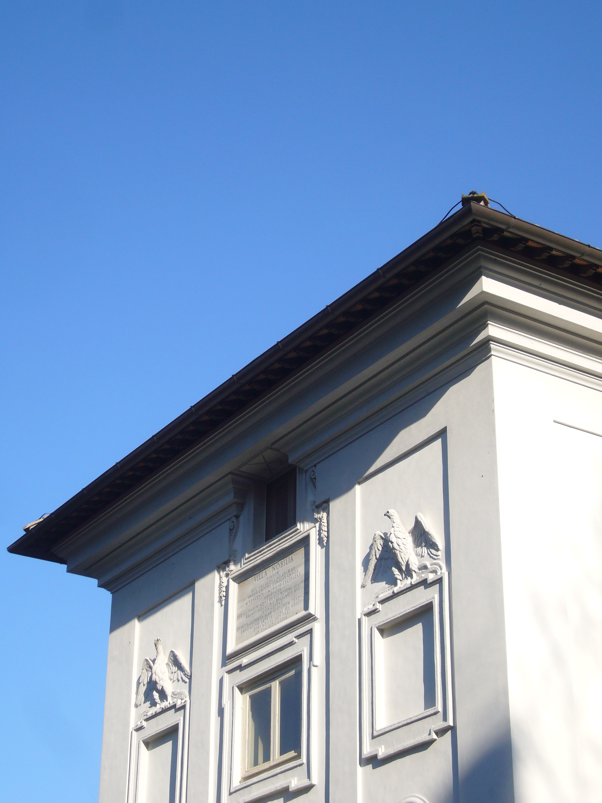 Roma, via Giacomo Medici, Villa Spada. Memoria della famiglia Nobili